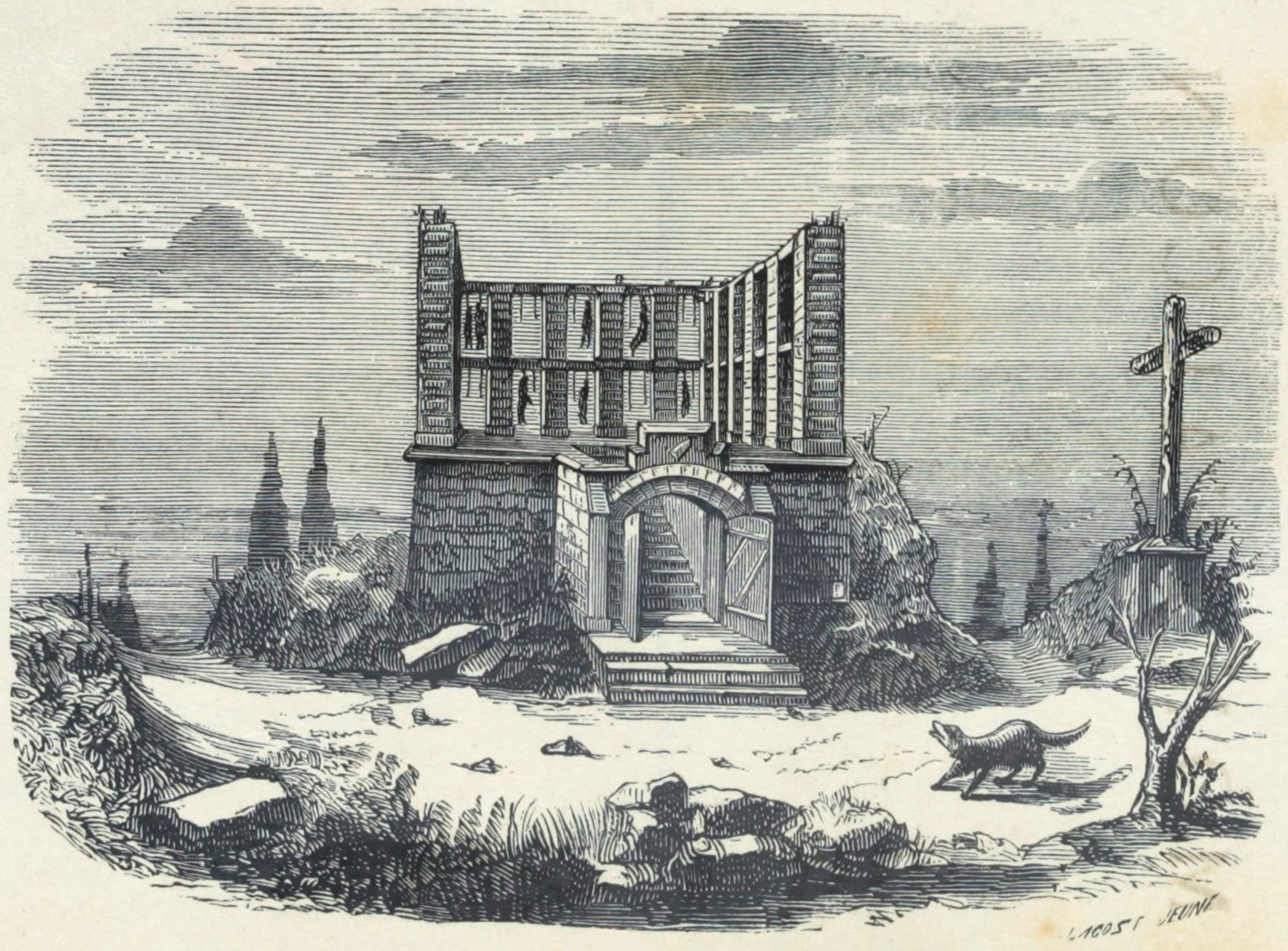 Représentation du gibet de Montfaucon avec 2 niveaux de poutres. Illustration extraite de l'ouvrage de Firmin Maillard, Le gibet de Montfaucon (étude sur le vieux Paris), Paris, Auguste Aubry éditeur, 1863